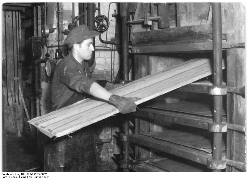 Berlin, Möbelfabrik, Furnierpresse Illus Funck 15.1.51 Qualitätsarbeit im VEB Berliner Möbelwerke. Im VEB Berliner Möbelwerke wurde ein Aktivistenplan aufgestellt, der eine Qualitätsverbesserung und Verbilligung der Möbel zum Ziel hat. Bestimmte Brigaden zeichnen jetzt für jeden Arbeitsvorgang verantwortlich. UBz: Der Tischler Werner Scholich an der Furnierpresse.